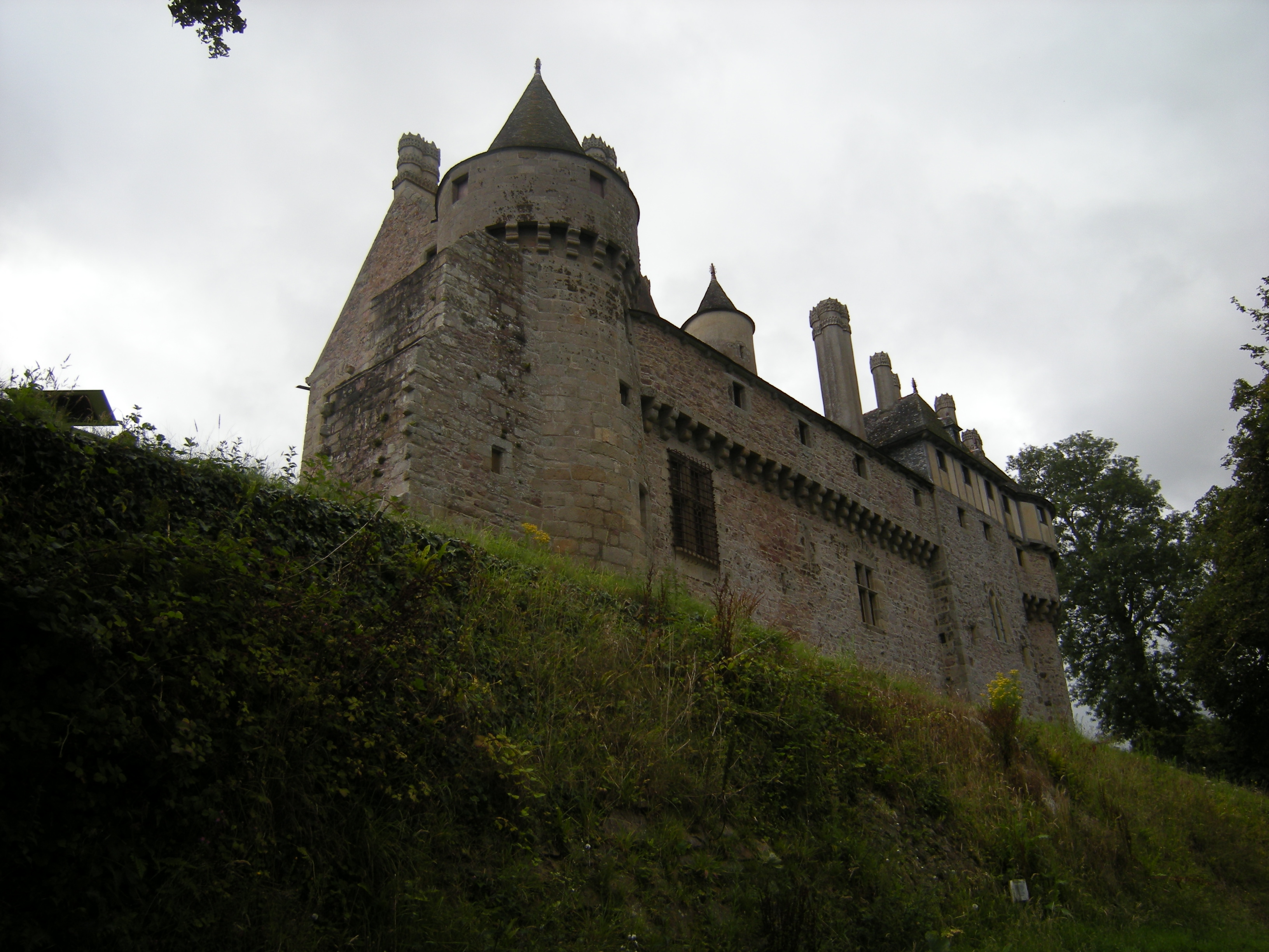 Château de la Roche-Jagu. Vues générales du château, des jardins et du Trieux